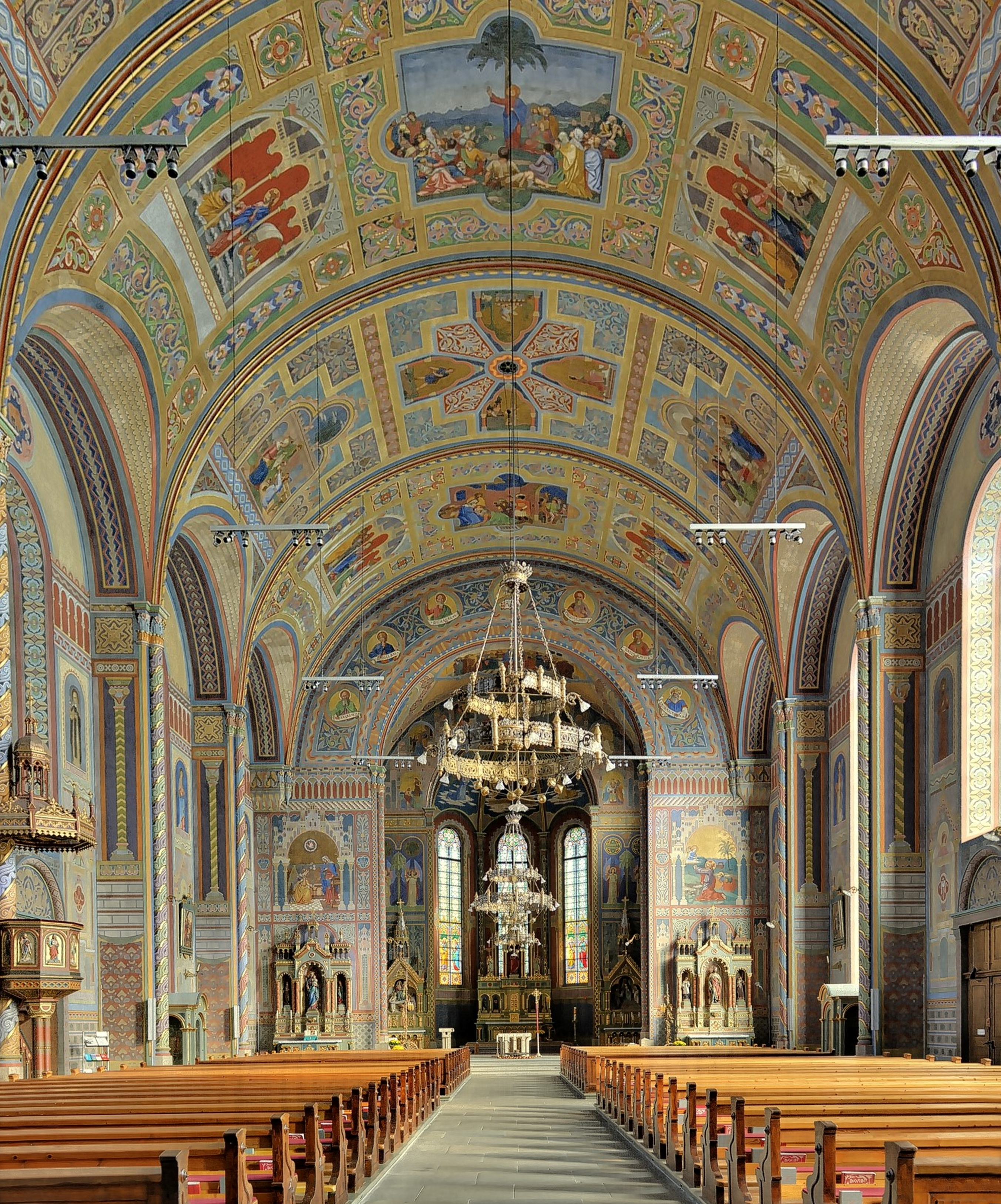 Pfarrkirche St.Leopold im Hatlerdorf, Dornbirn Dieses Bild wurde anlässlich des österreichischen Tags des Denkmals 2014 in Vorarlberg eingereicht.